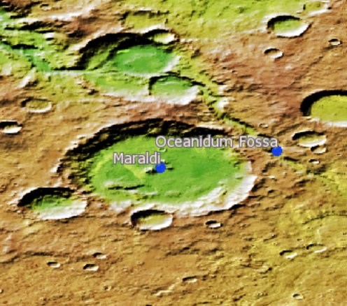 Cráter marciano Maraldi. (Imagen IAU/USGS/Goddard/A SU/USGS)